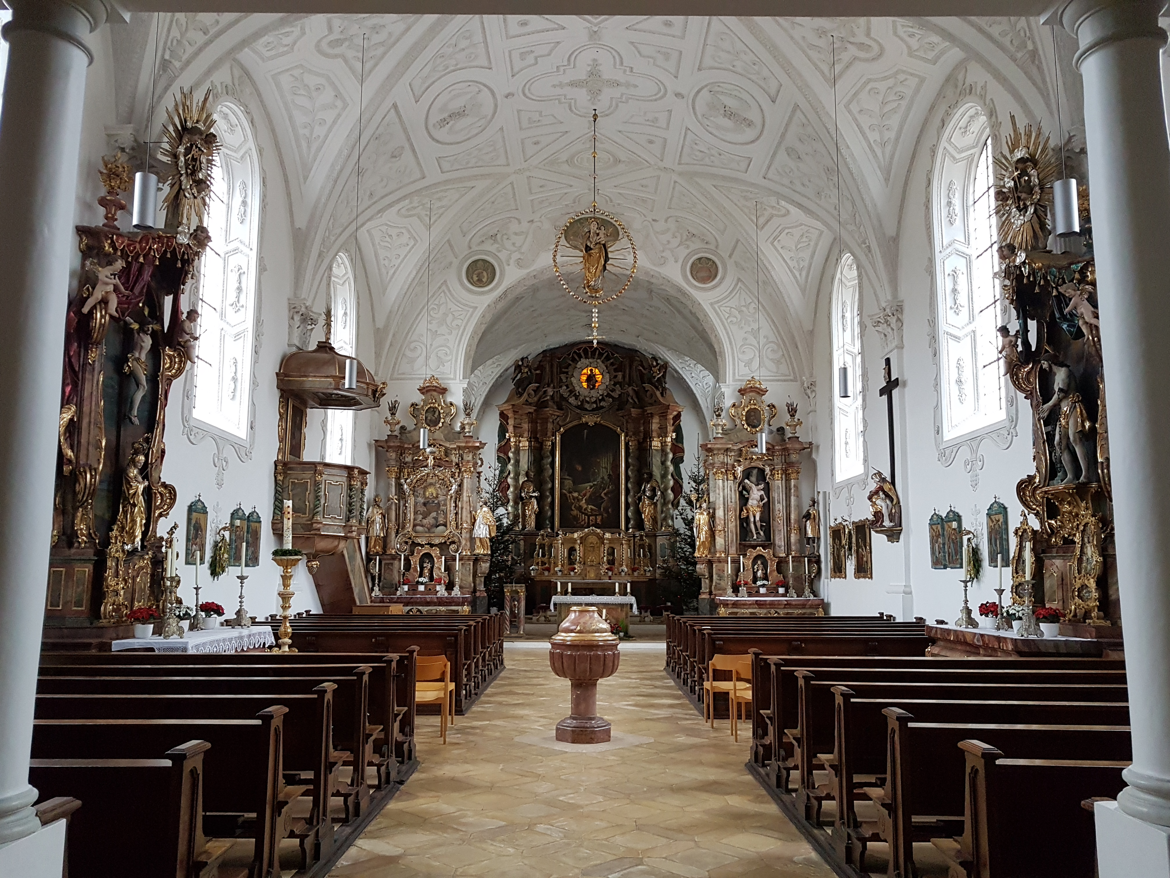 München-Oberföhring, Pfarrkirche St. Lorenz, der reichdekorierte hochbarocke Innenraum mit Blick zum Chor.